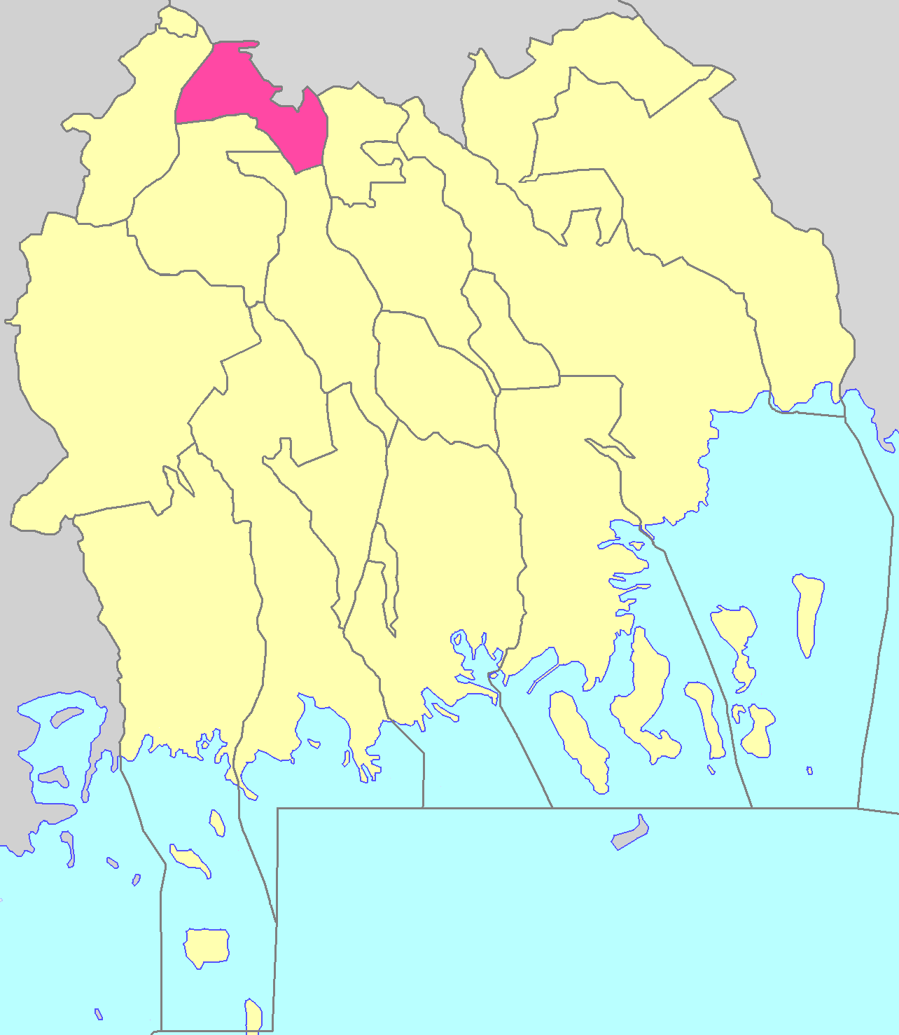 Чаганське сільське поселення